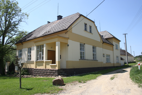 Košetice - dům na návsi, okres Plzeň-sever, Česká republika